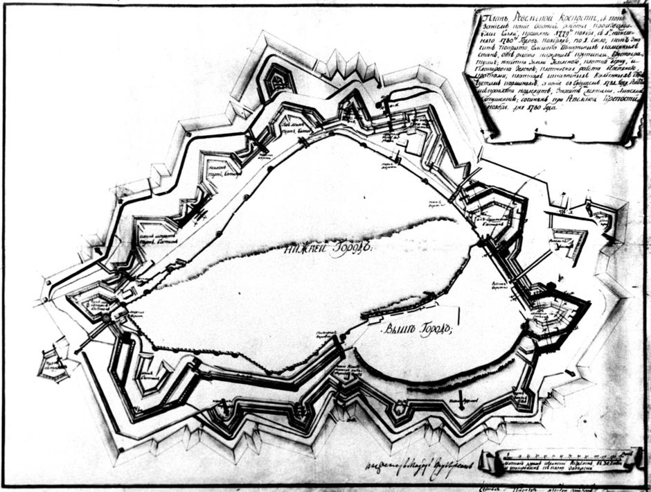 Tallinna muldkindlustusvööndi skeem